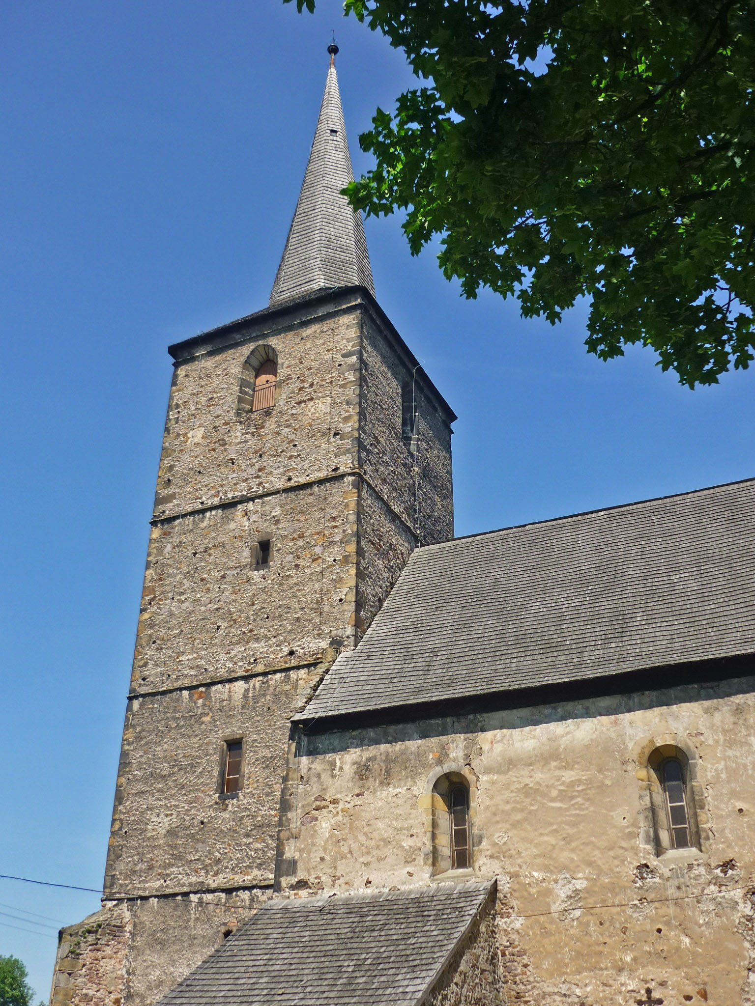 Romanische Kirche in Schönau an der Katzbach (Świerzawa) im Bober-Katzbach-Gebirge in Niederschlesien